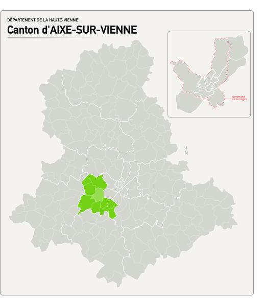 Carte du nouveau canton d'Aixe-sur-Vienne.